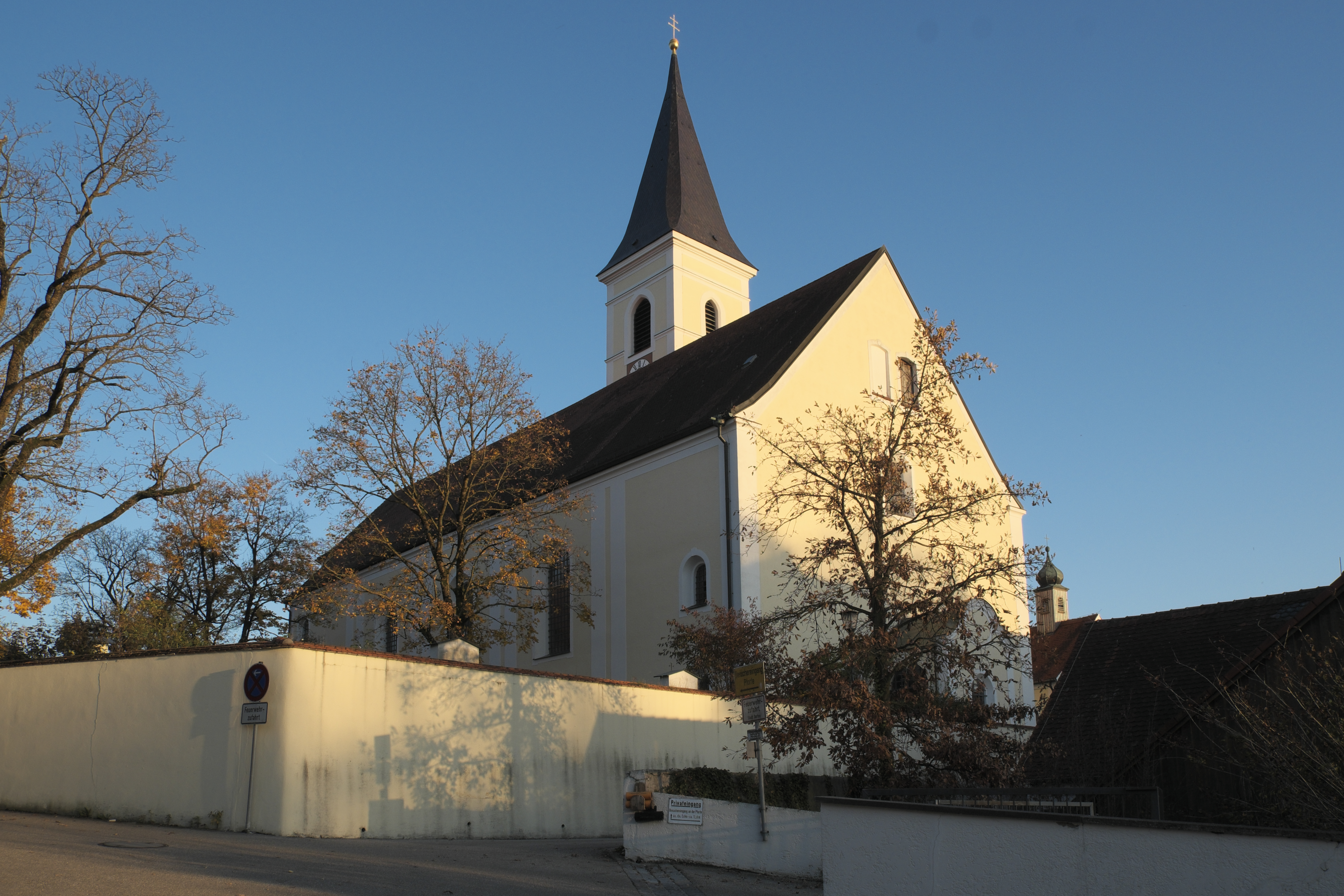 Katholische Pfarr- und Wallfahrtskirche Maria Dorfen in Dorfen im Landkreis Erding (Bayern/Deutschland)